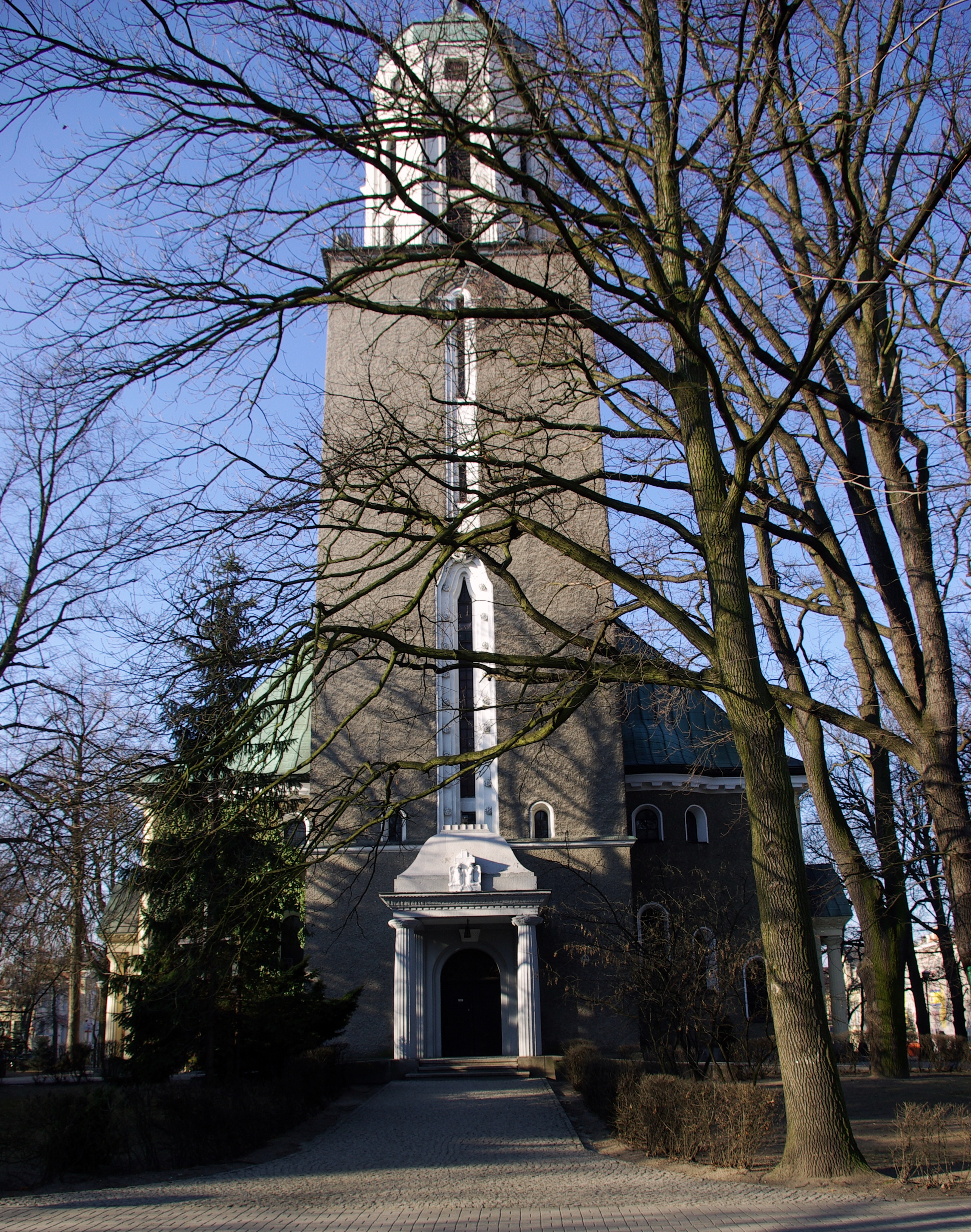 Zielona Góra, kościół parafialny p.w. Najświętszego Zbawiciela